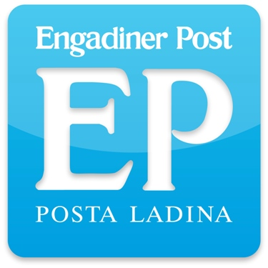 Logo der Engadiner Post / Posta Ladina